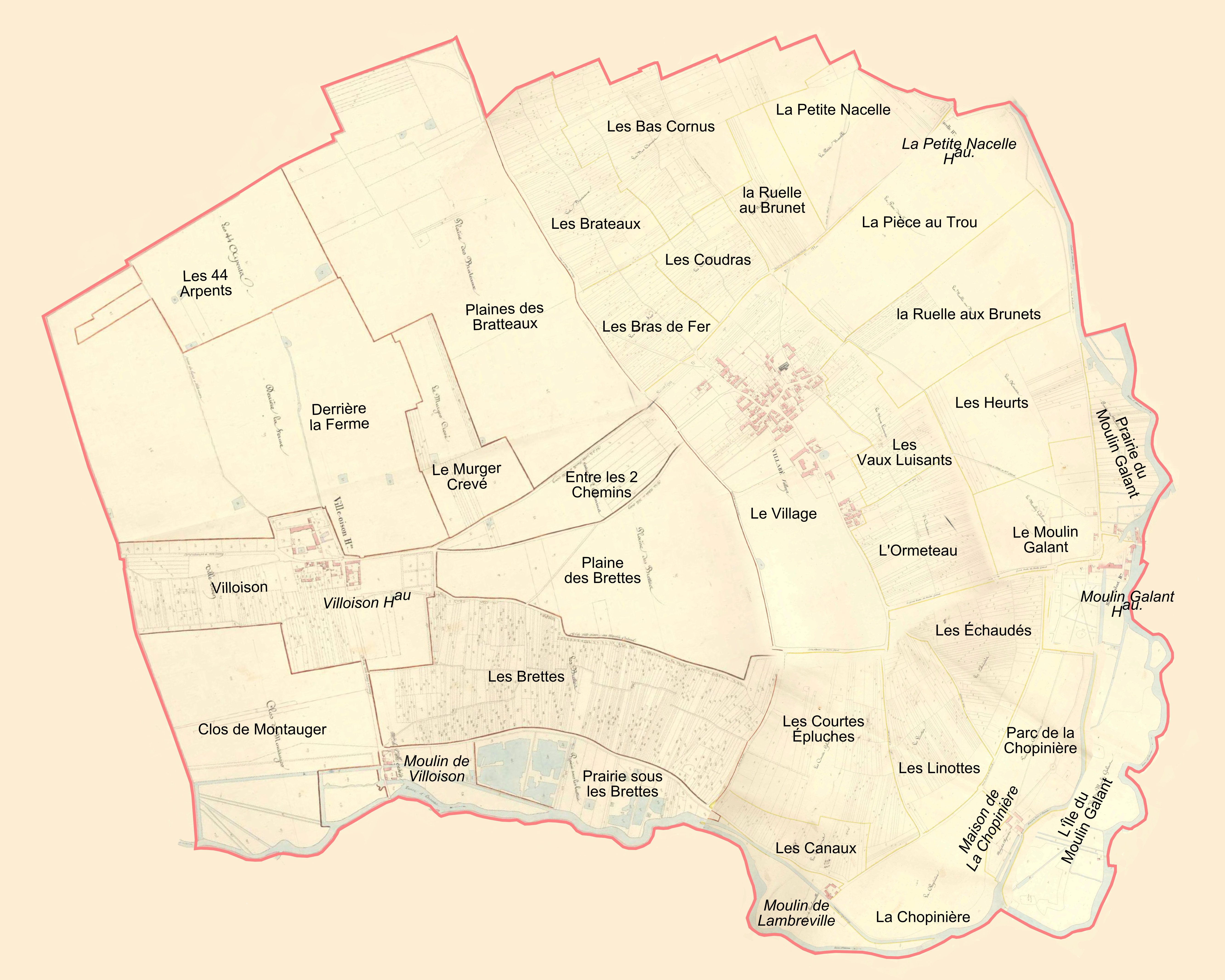 Plan de Villabé au début du XIXe siècle extrait du cadastre napoléonien (version avec ajout des noms des hameaux et lieux-dits).